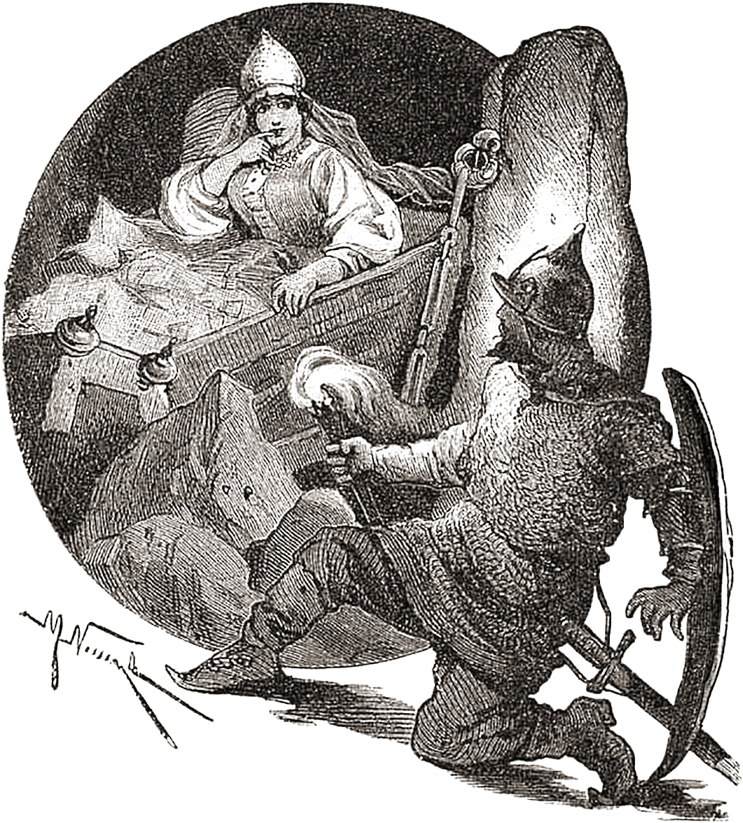 Пушкин А. С. «Сказка о мертвой царевне и семи богатырях». Рис. М. В. Нестерова. — Москва: А. Д. Ступин, 1889. — 32 с.